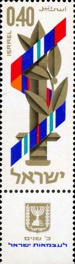 בול יום העצמאות תשכ"ח